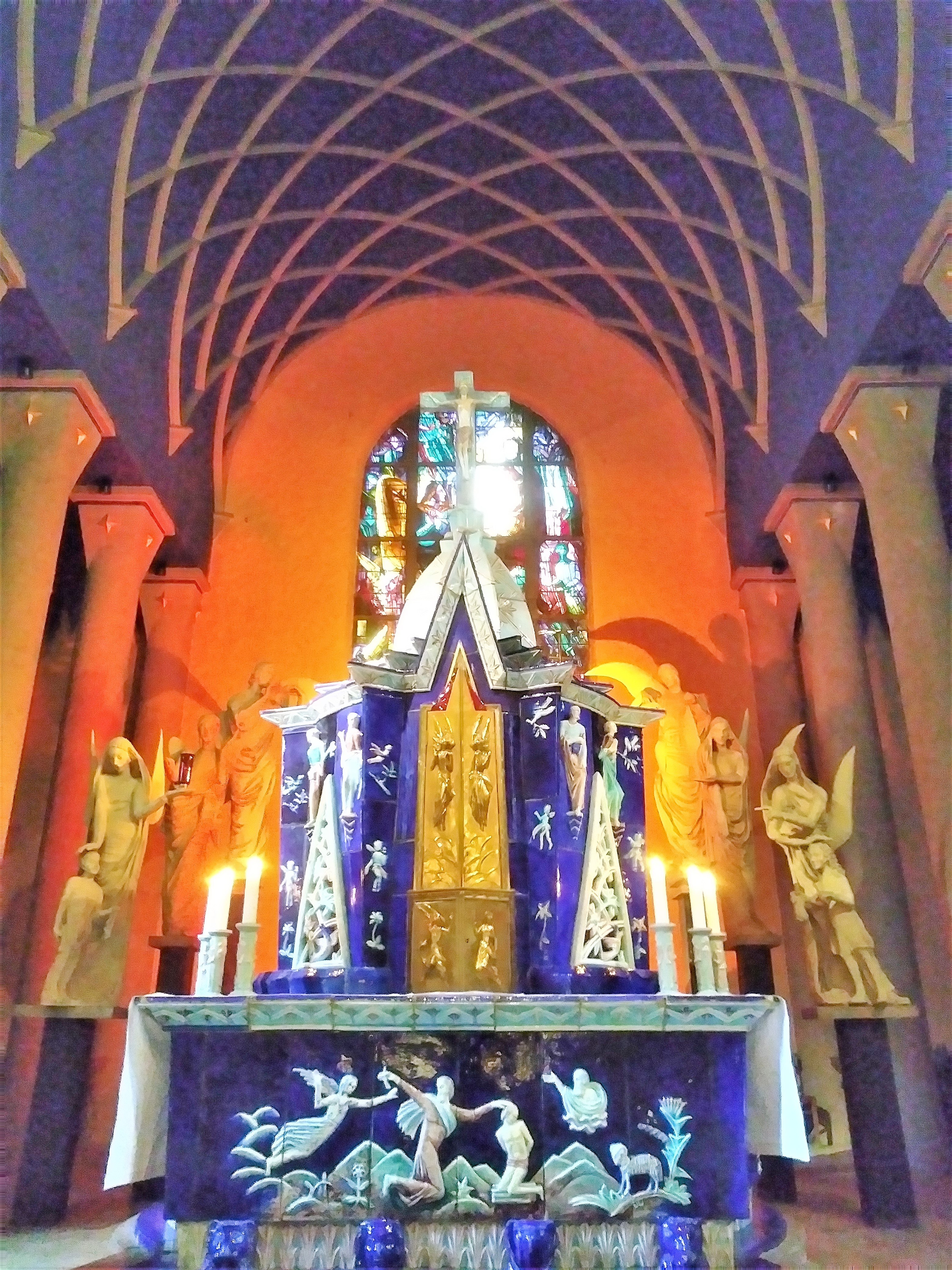 Hochaltar des Saarbrücker Doms St. Michael